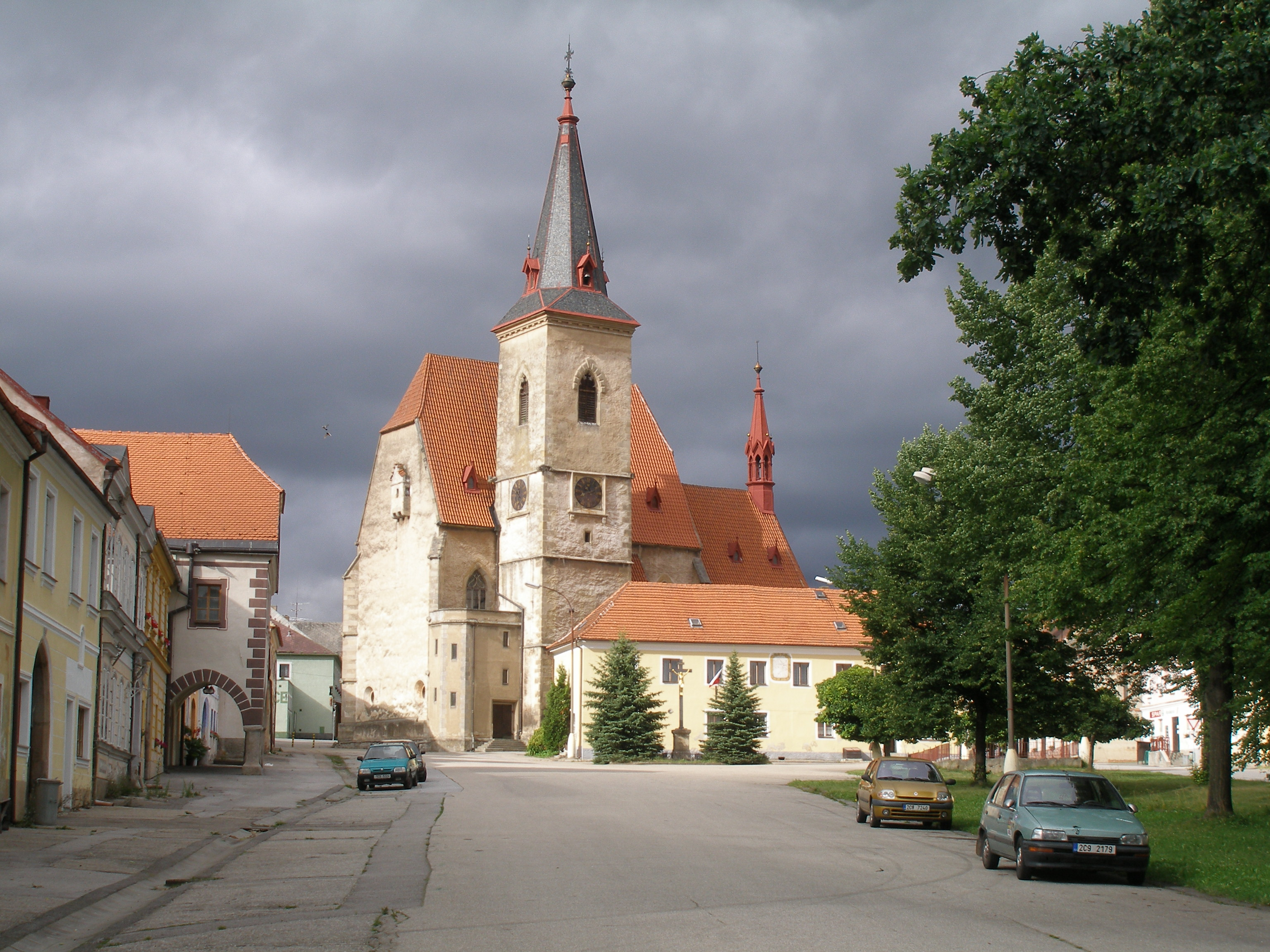 Chvalšiny - kostel sv Máří Magdalény od jihu